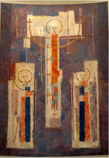 Urschenheim (Haut-Rhin, France), église St Georges, toile "l'Ascension" de Léon ZACK.